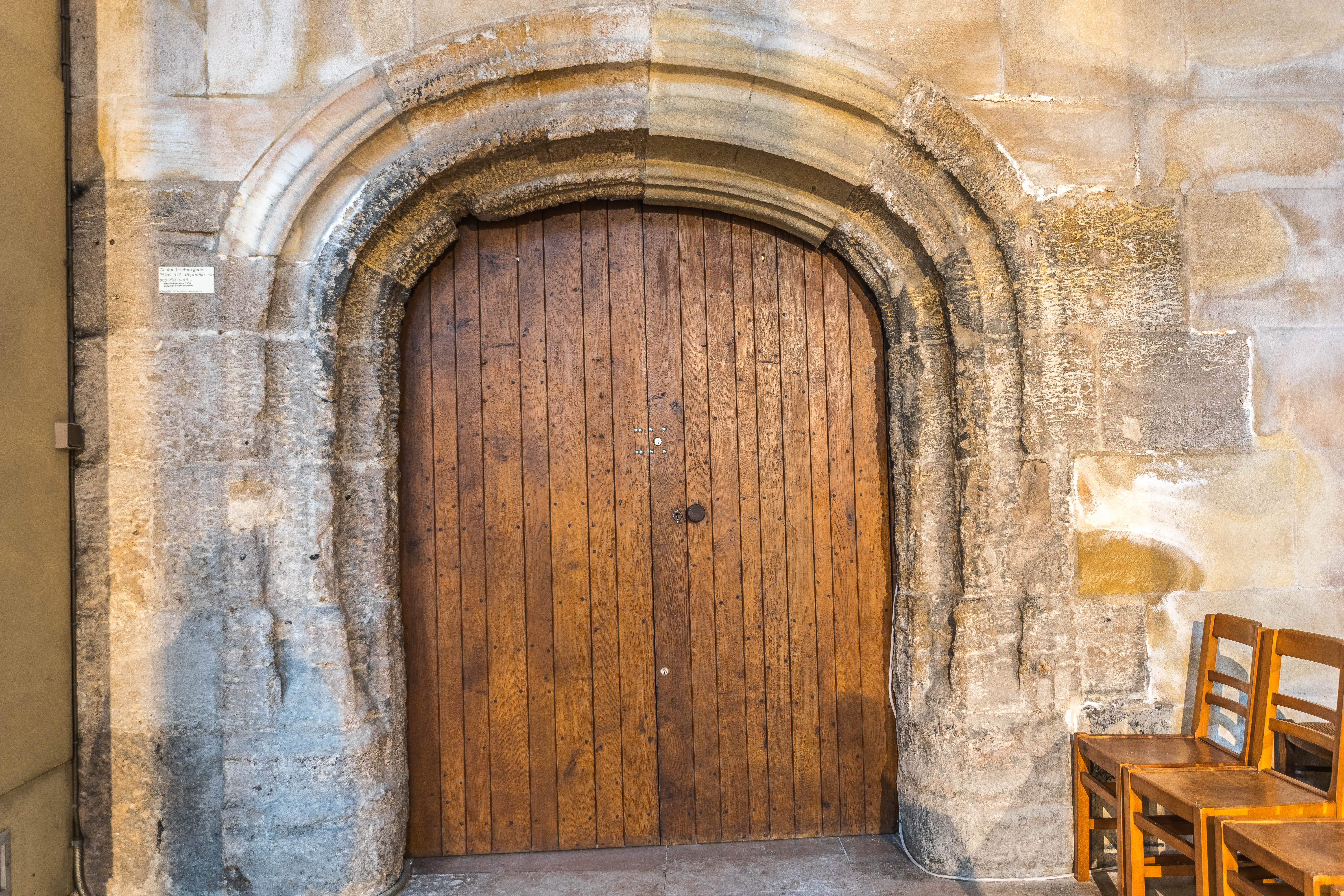 Entrée de la tour. Par le passé elle était dehors, et la tour était certainement distant de la chapelle Notre-Dame. La tour est vraiment attaché relié à l'église qu'avec la construction de l'église actuelle et de sa façade au début du XVIIè siècle.